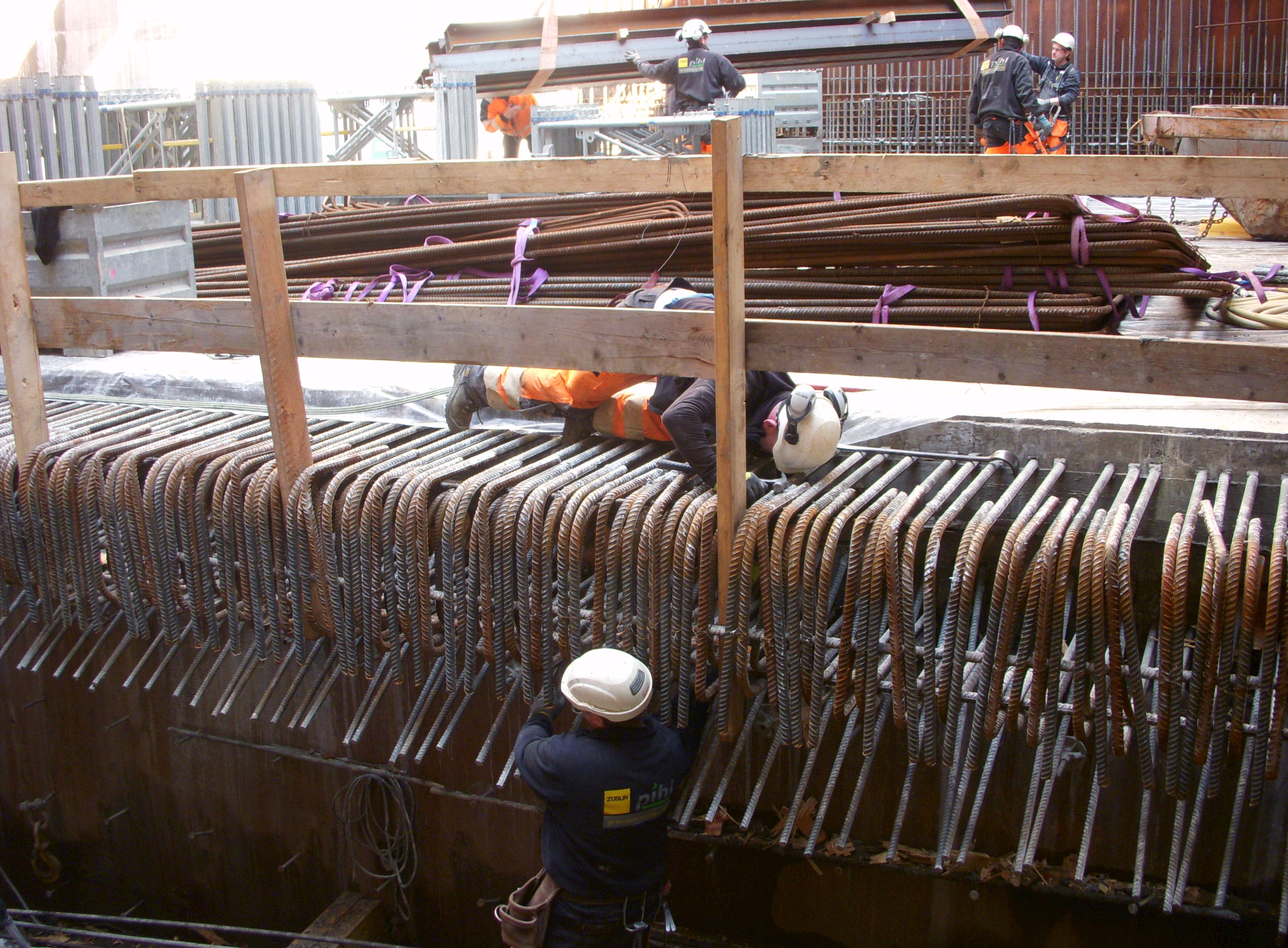 Citybanan Sänktunnel april 2013: armering Riddarholmssidan